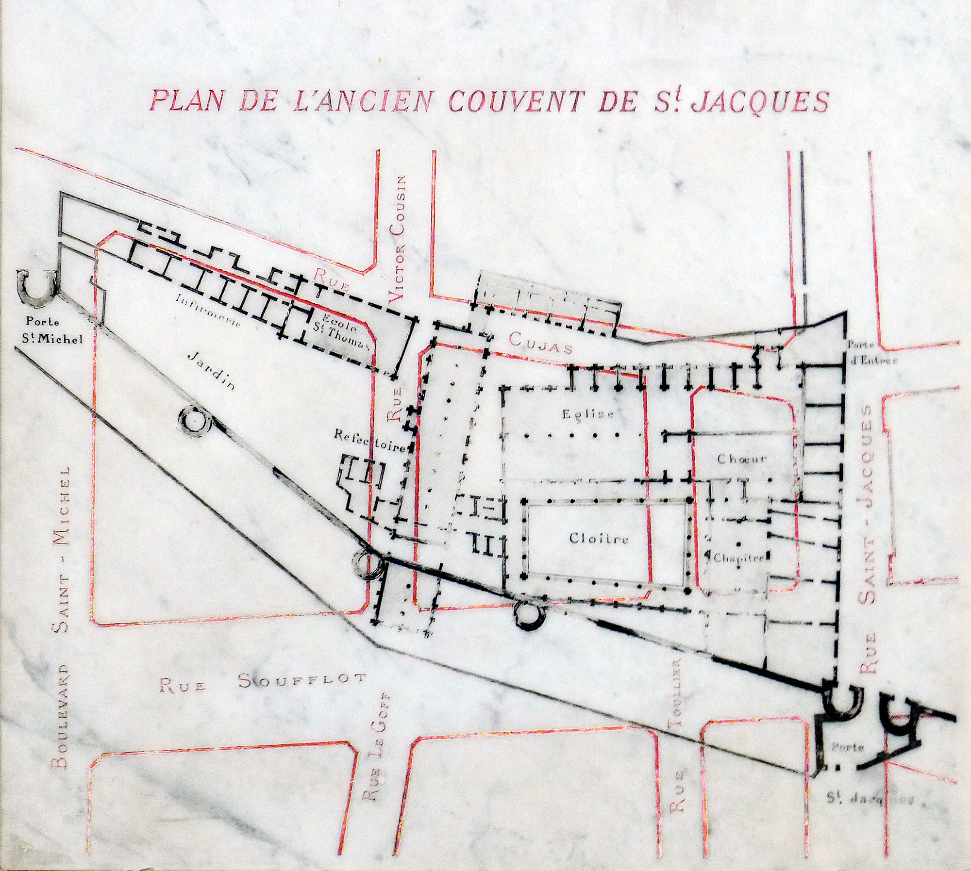 Plan de l'ancien couvent de Saint-Jacques et de l'enceinte de Philippe-Auguste exposé dans l'église Saint-Etienne (en noir) sur le tracé actuel du quartier (en rouge) - Paris V